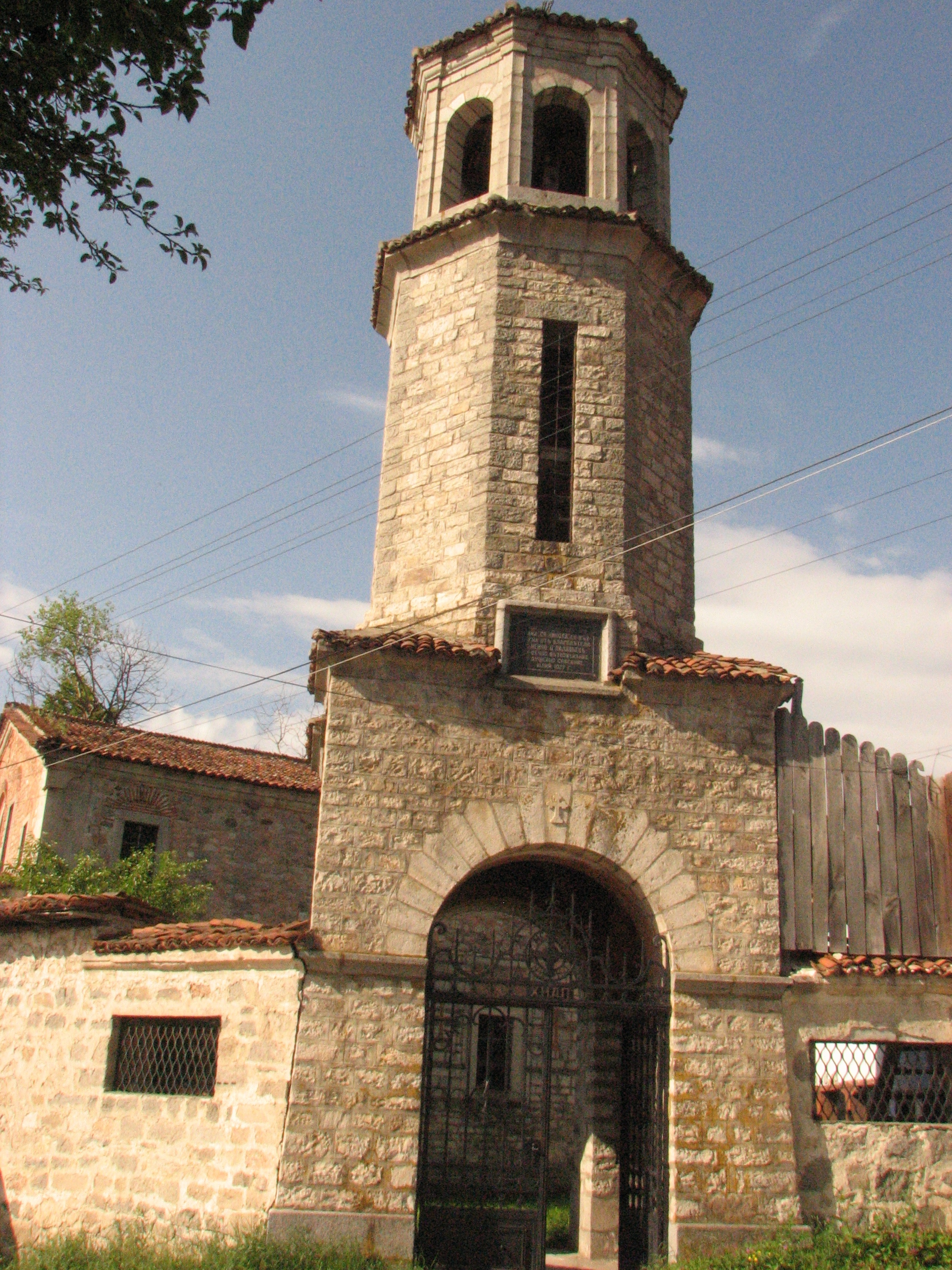 Камбанарията на нрам "Светителя отца нашего Николай"